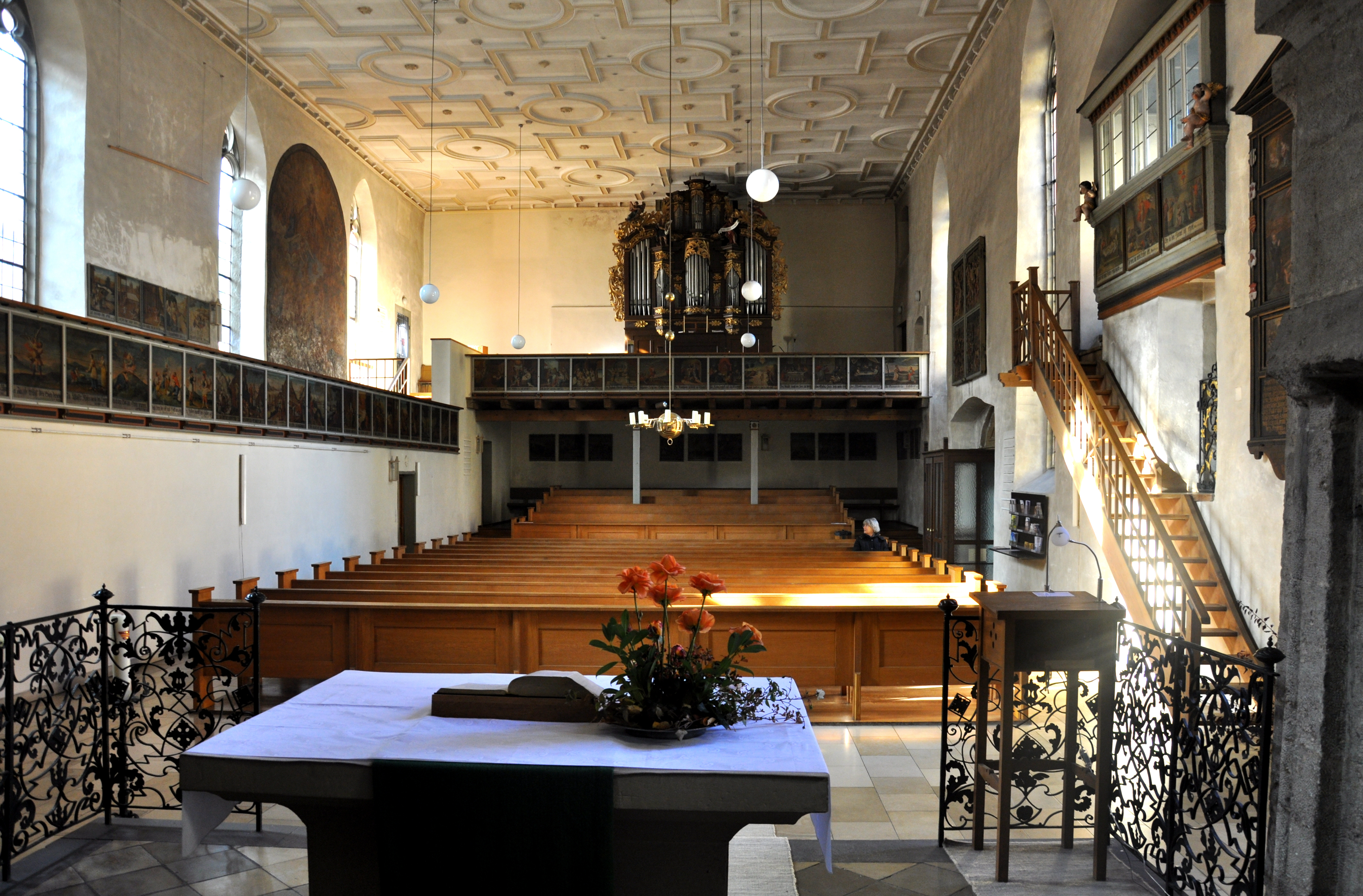 Marktbreit, Evangelisch-lutherische Stadtpfarrkirche St. Nikolai, Innenansicht, Blick zur Orgelempore